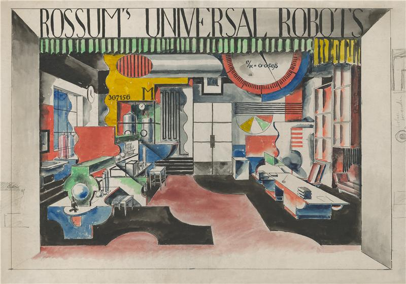 Scénický návrh Bedřicha Feuersteina k dramatu R.U.R.